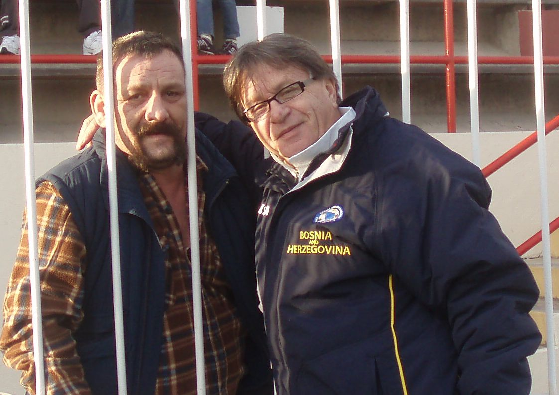 Ćiro Blažević na Orijentovom igralištu u Rijeci